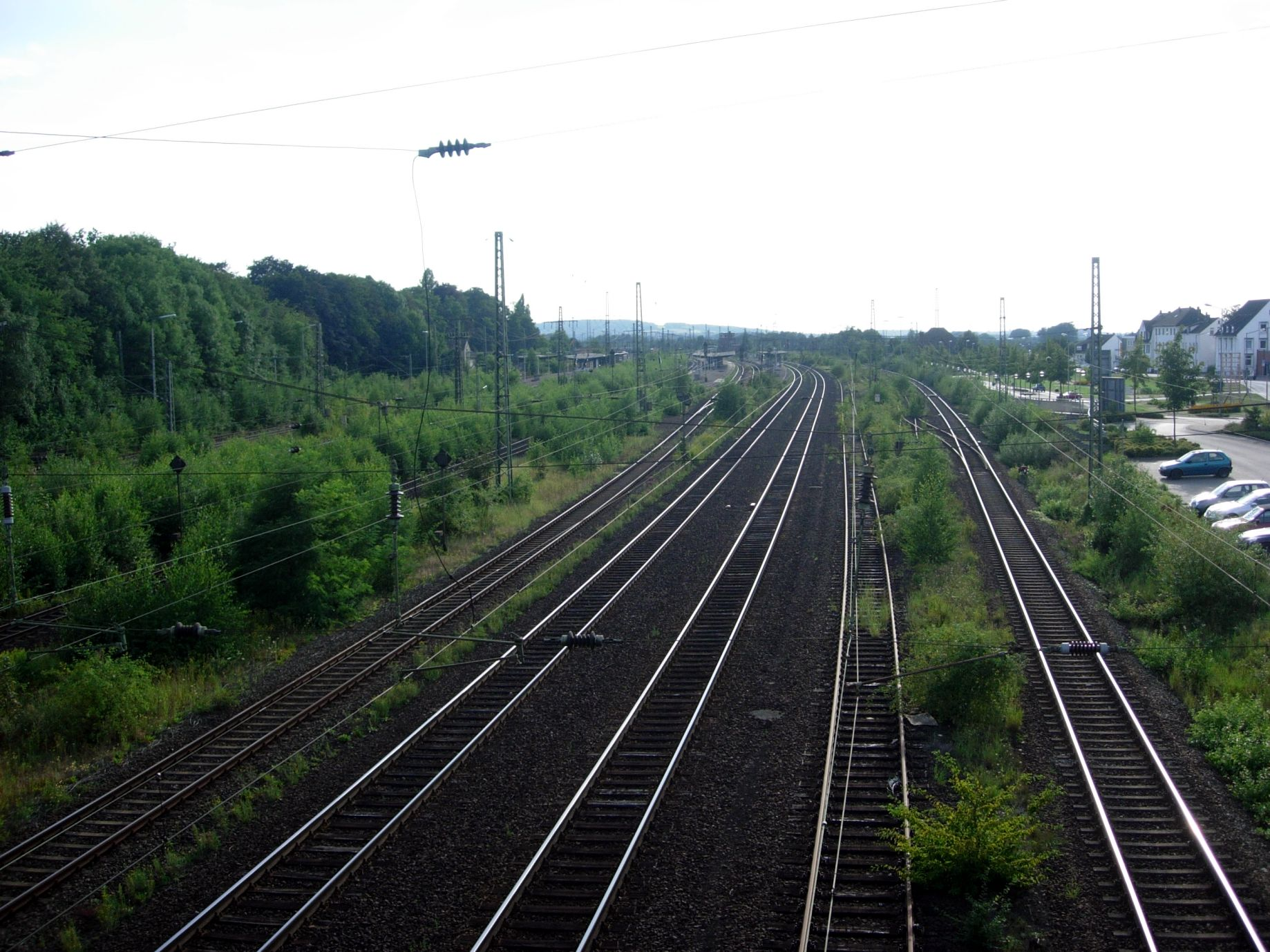 Löhne Bahnhof, fotografiert von der Königsbrücke